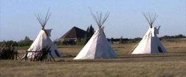 Tipis à Wanuskewin. 9-9-2006